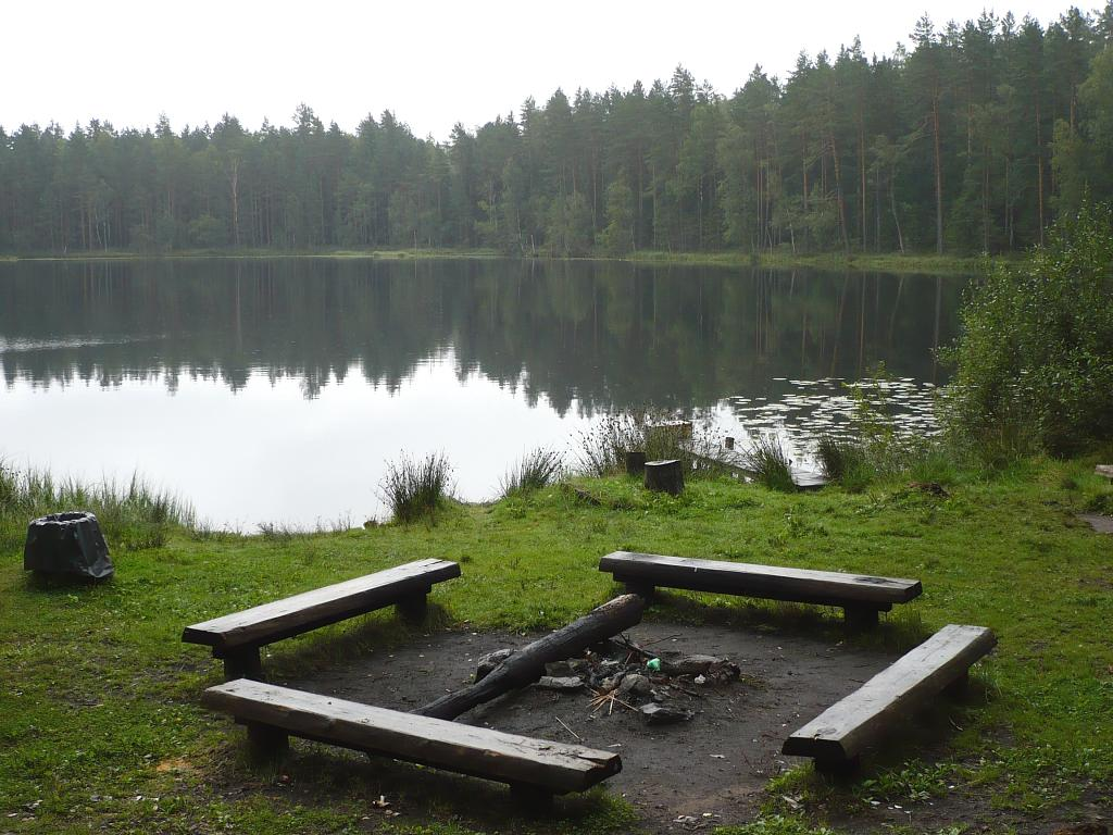 Lejas ezers pie Daugmales - Baldones ceļa 2008-08-25